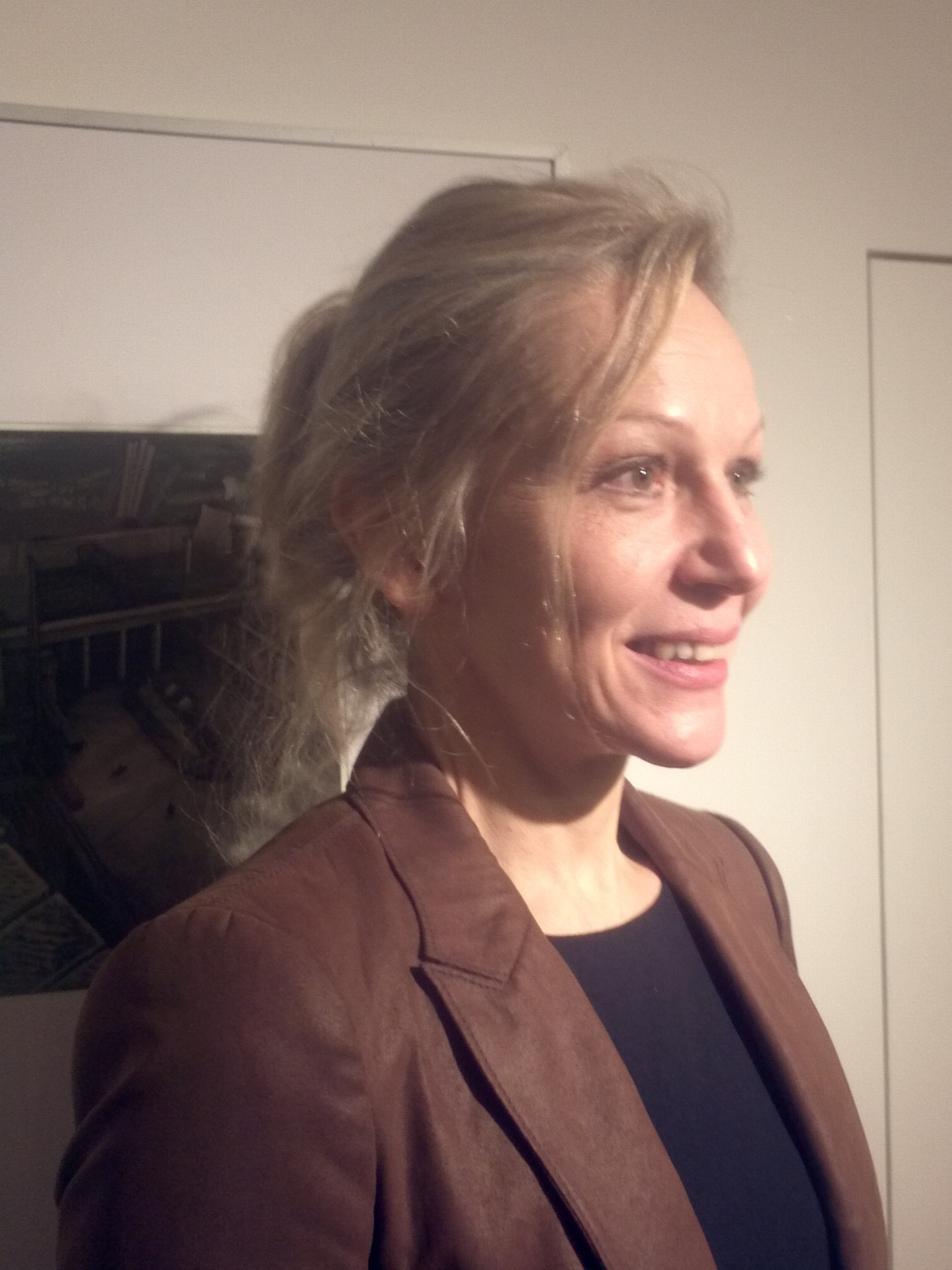 Sabine Arlitt in Wettingen vor einem Werk von Peter Bräuninger